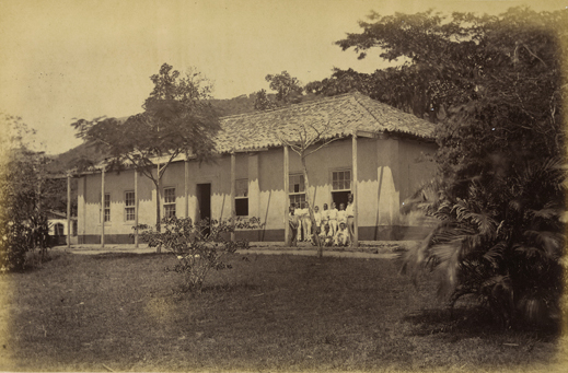 Título [Solar da Imperatriz] [Iconográfico] Imprenta Rio de Janeiro, RJ : [s.n.], [1875]. Descrição original 1 foto : pb.